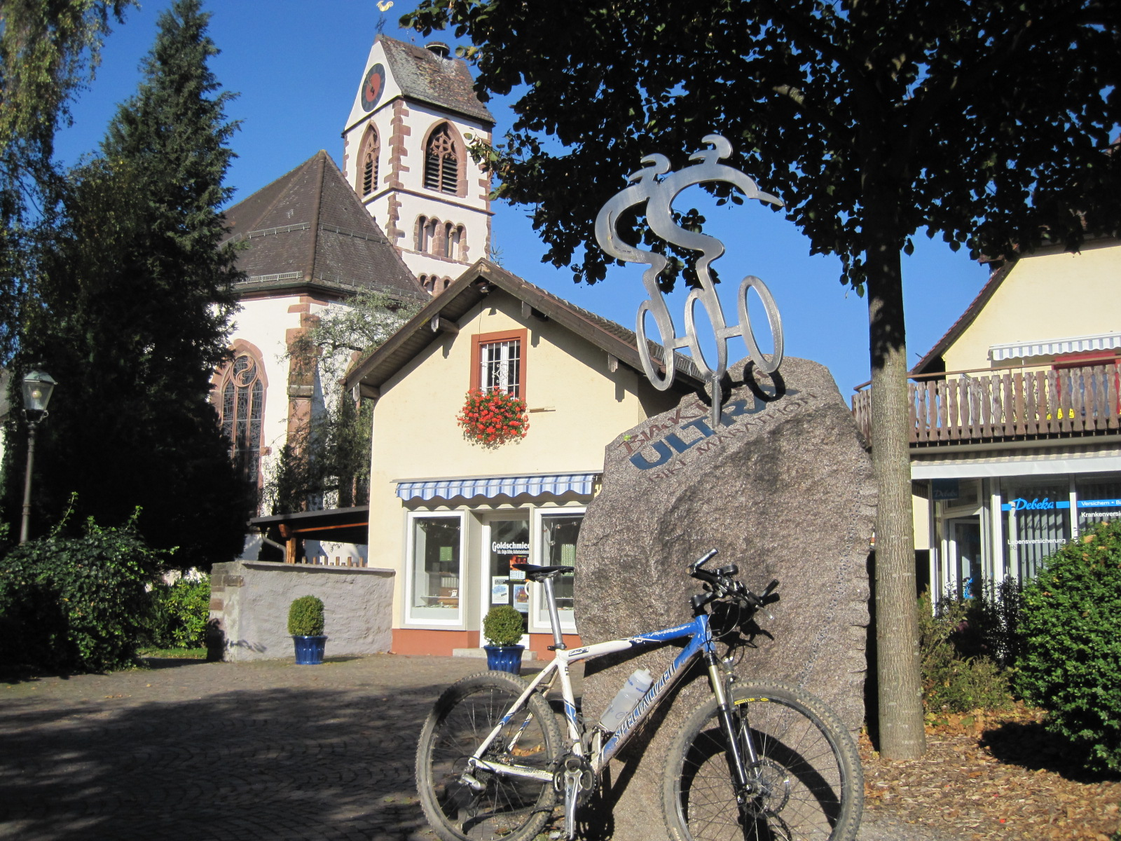 Ultra Bike Denkmal in Kirchzarten